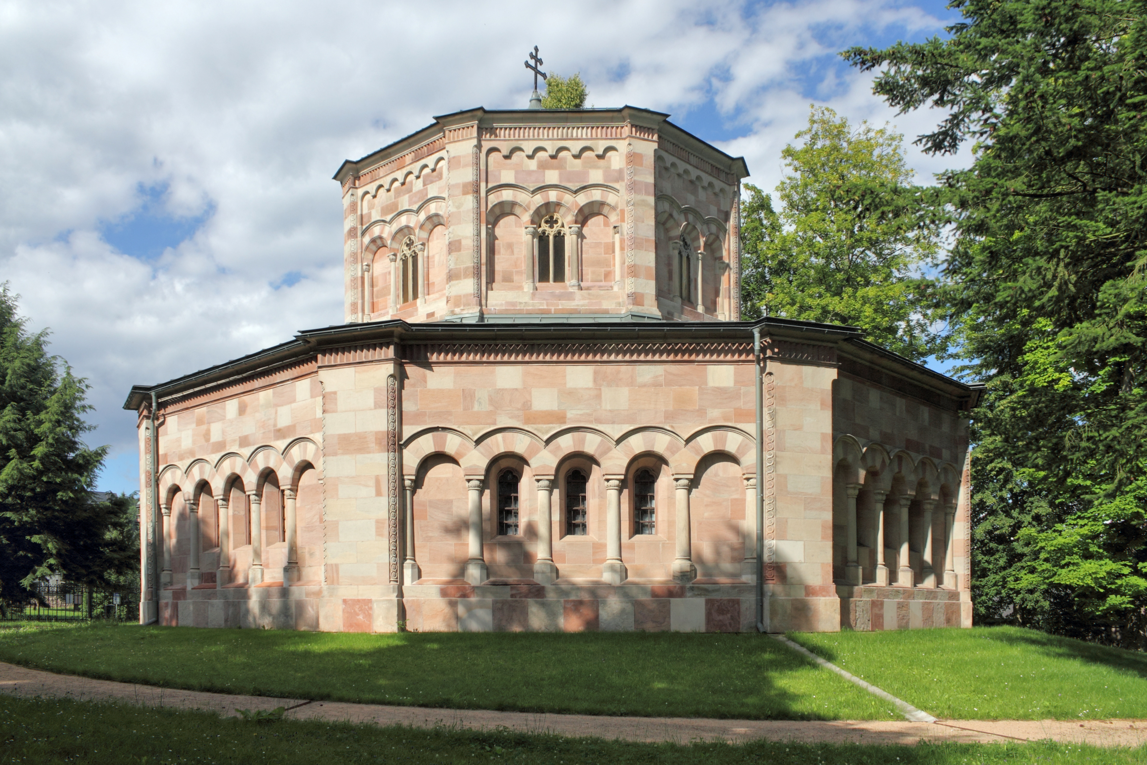 Mauzoleum - Harrachovská hrobka (Horní Branná), Horní Branná